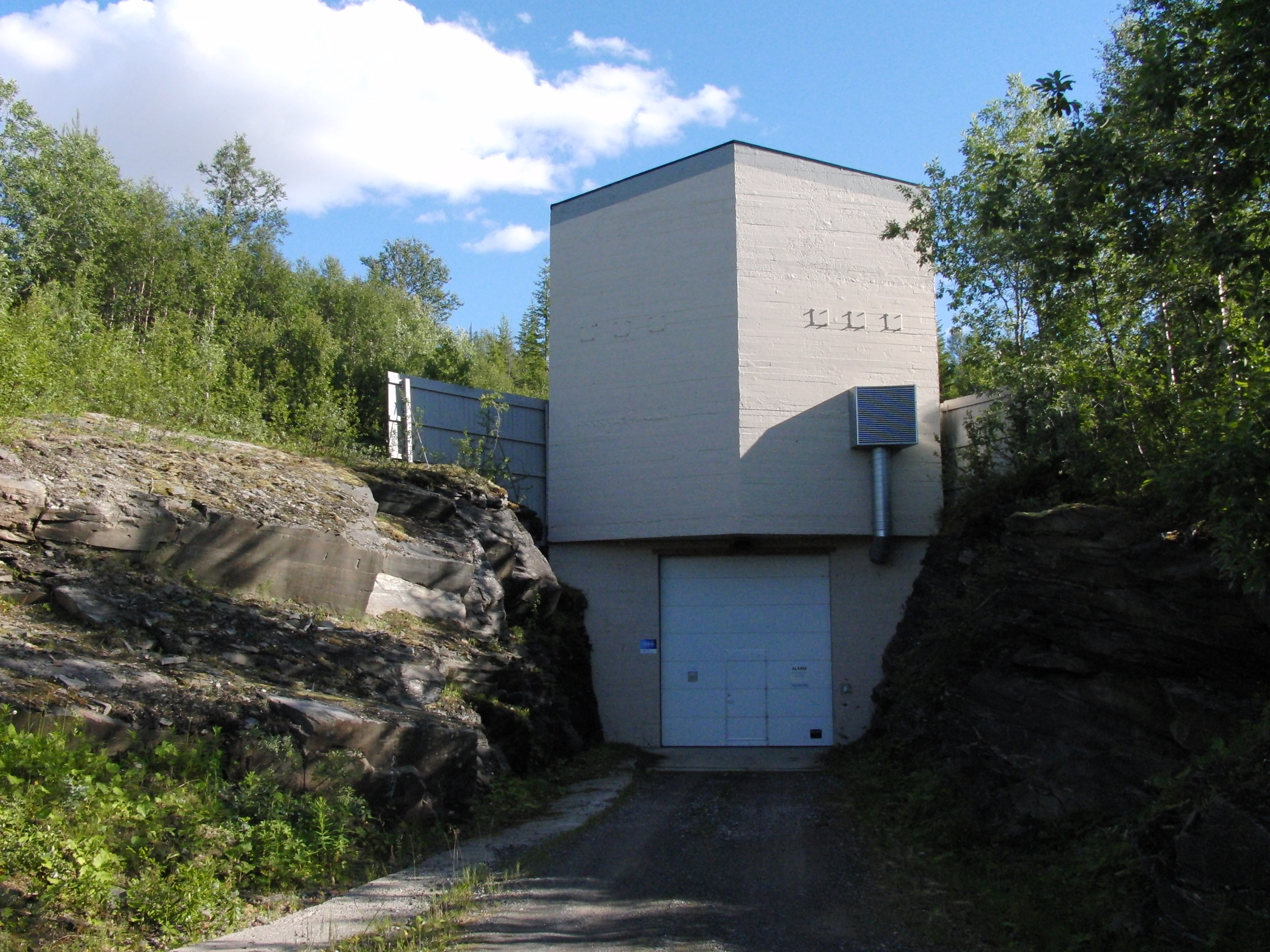 Daja kraftverk